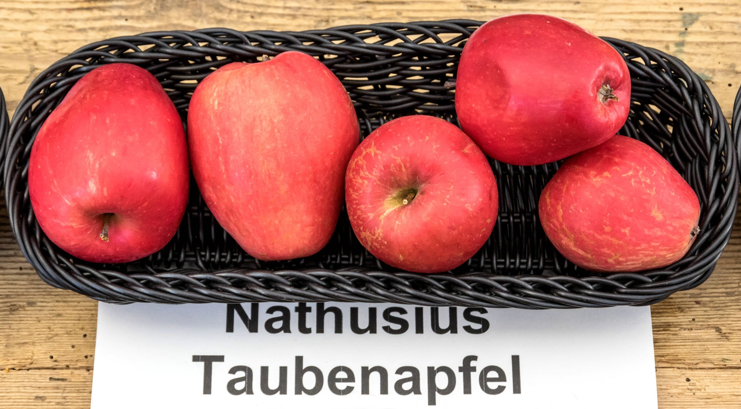 Alte Apfelsorten, von denen es im Badischen noch tragende Bäume gibt. Alle Aufnahmen au dem Oktober 2015